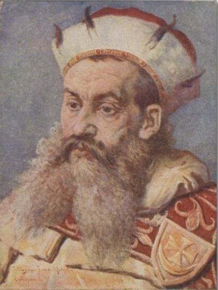 Henryk I Brodaty, książę Polski (senior), wg J. Matejki.